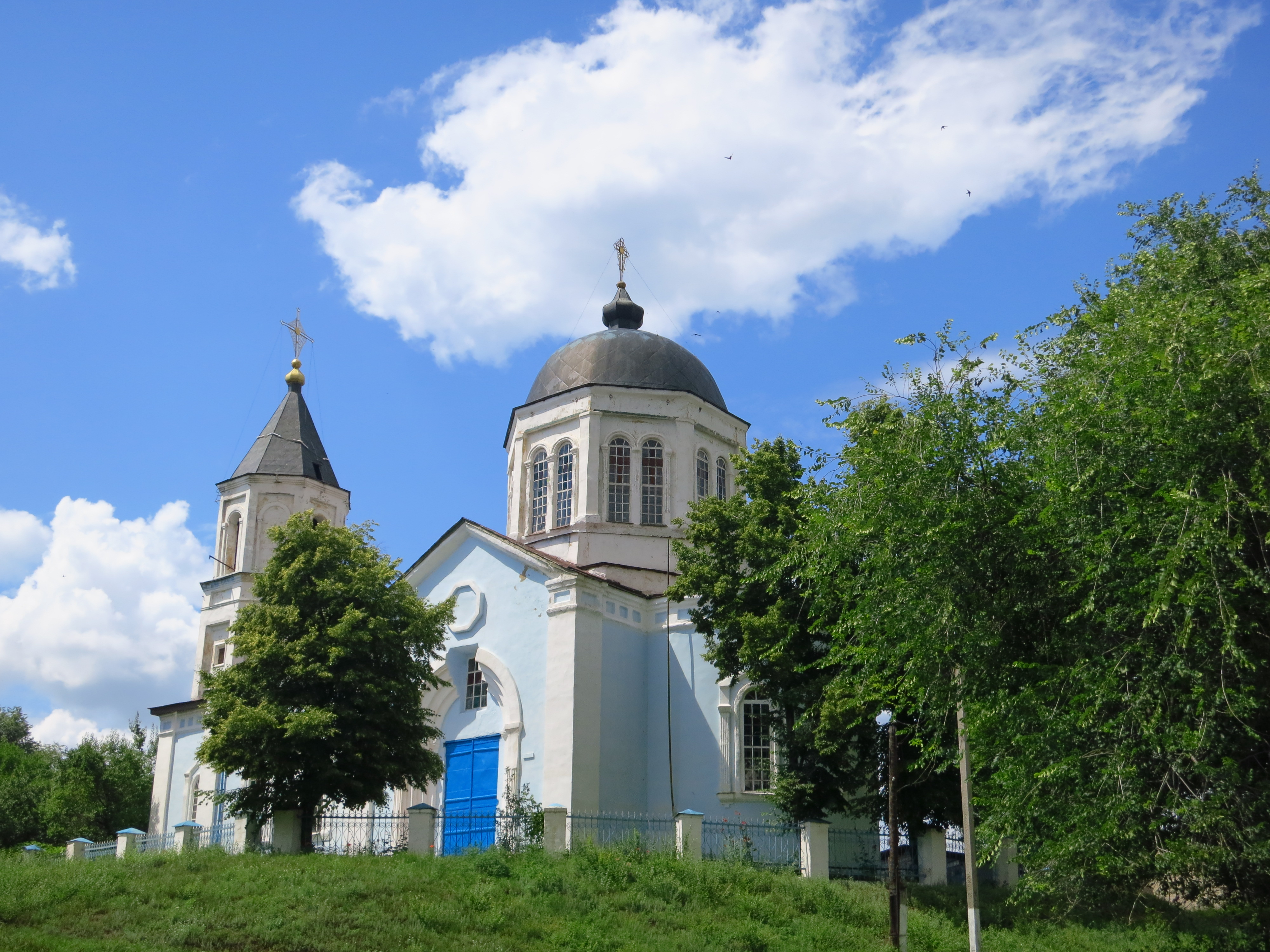 Церква Вознесенська з дзвіницею (діюча), Сенькове